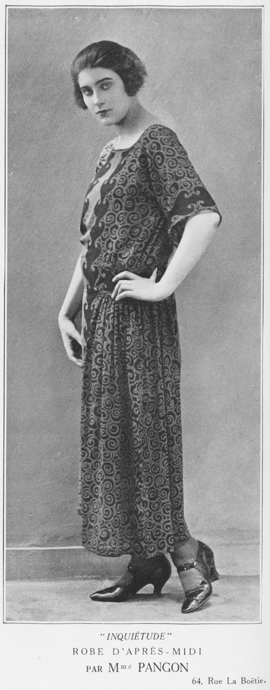 Reproduction d'une robe de Madame Pangon